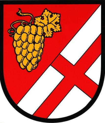 Vinařice, okres Mladá Boleslav, znak